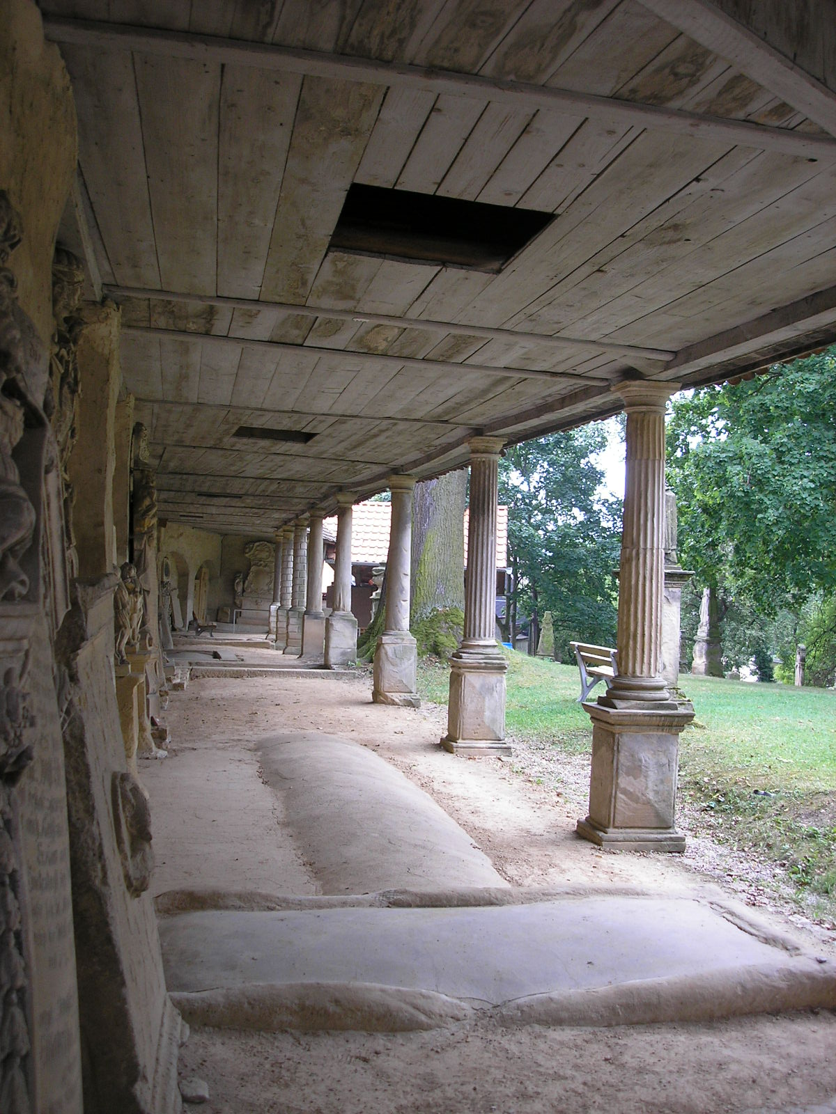 Blick in den Camposanto (historischer Friedhof) in Buttstädt (Thüringen).